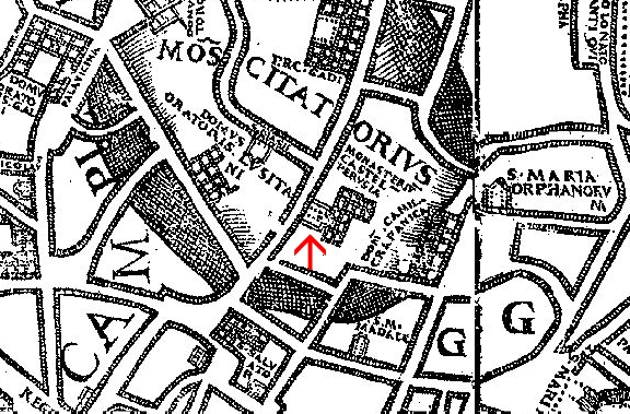 Pianta di Bufalini